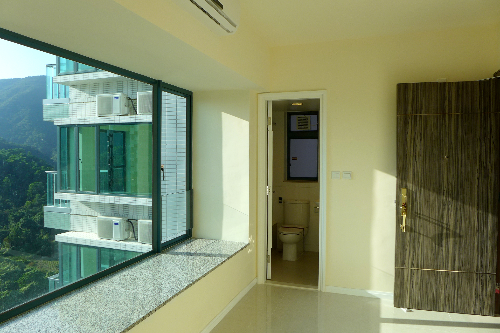 Mont Vert Studio Flat, Tai Po